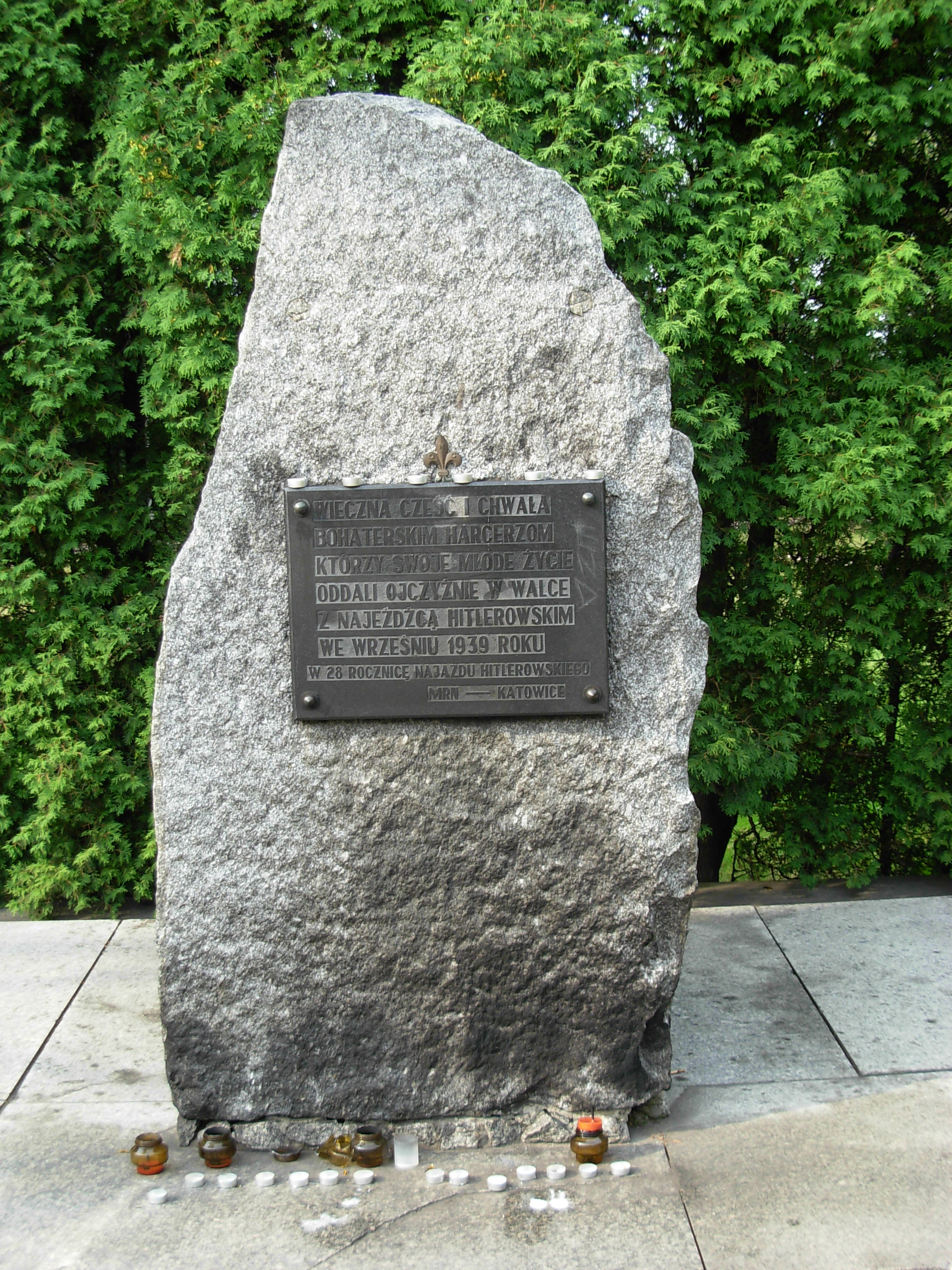 Katowice